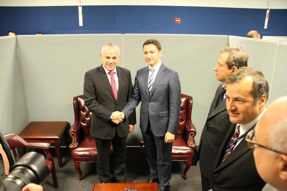 Кристиан Вигенин разговаря с министъра на международните отношения, разузнаването и стратегическите въпроси на Израел Ювал Щайниц Kristian Vigenin talks with the Israel’s Minister of Intelligence, International Relations and Strategic Affairs Dr. Yuval Steinitz